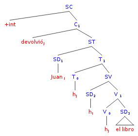 Una oración interrogativa simple analizada como sintagma complementante con sujeto (Juani) y verbo (devolviój) desplazados dejando atrás las correspondientes huellas (hi) y (hj , huella doble). El rasgo +int se refiere a que el especificador tiene rasgos marcando la oración como interrogativa